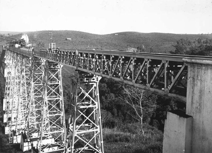 Foto. Spoorbrug bij Sasaksaät, West-Java